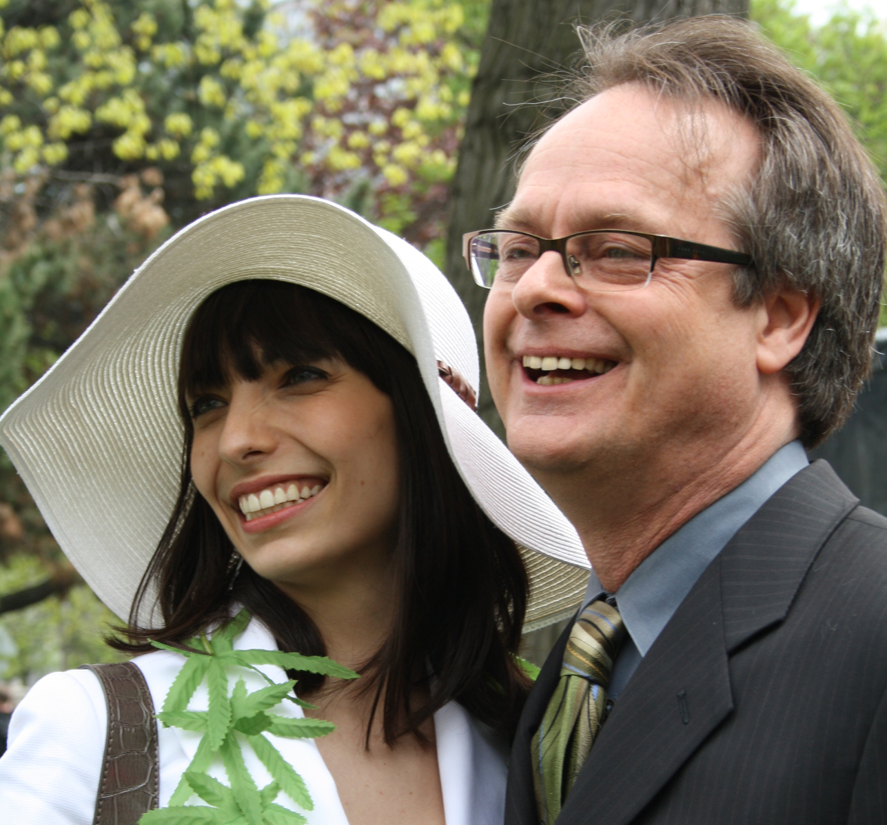 Photo de Marc Emery and Jodie Emery par Sadie C.